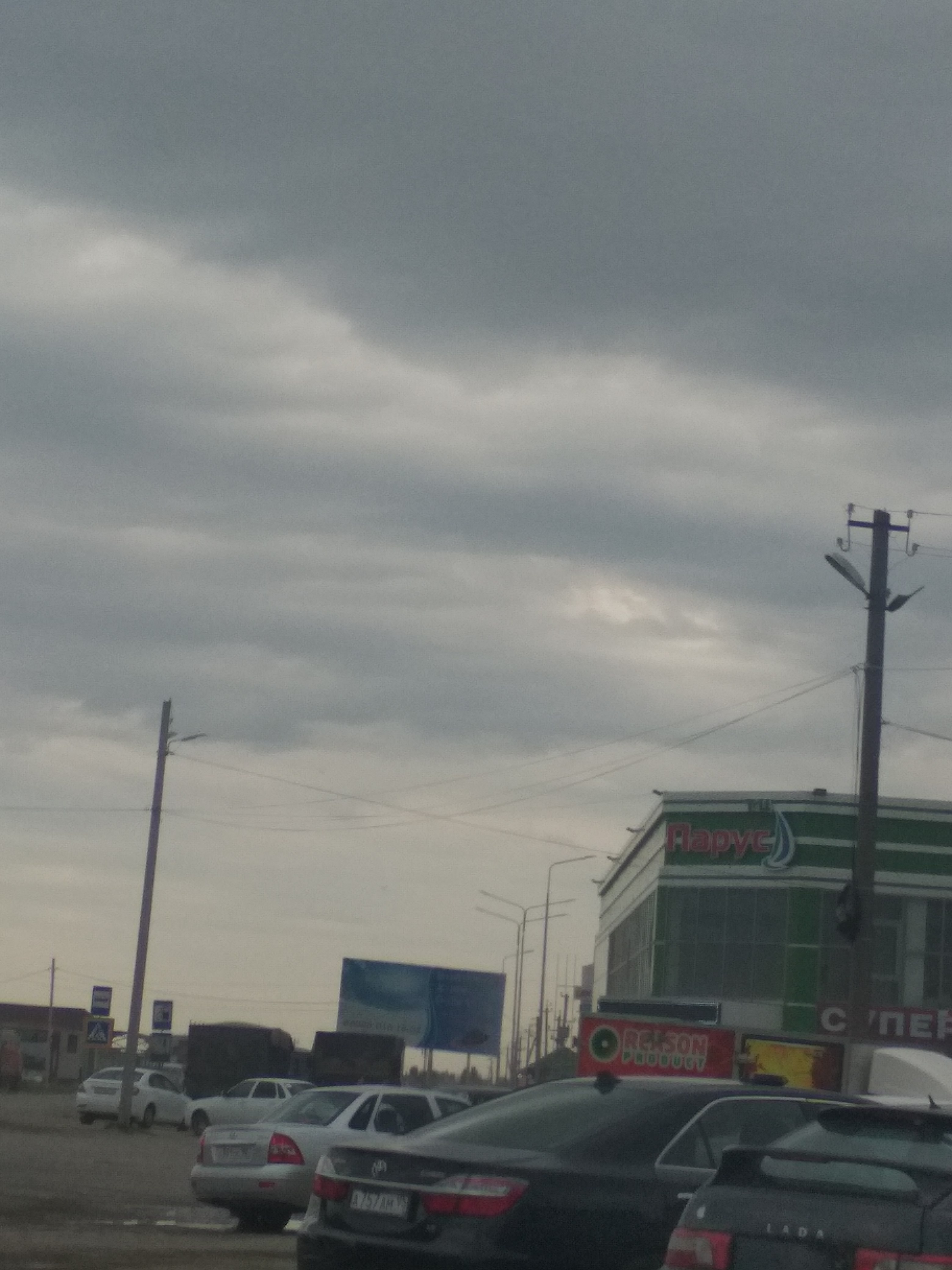 Нохчийн: Оьрза-ГӀалара некъаш декъало меттиг